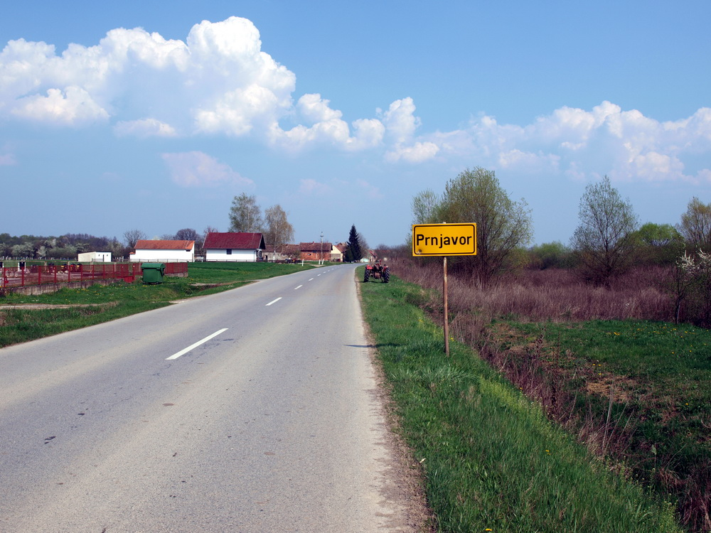 Ulaz u selo Prnjavor, Brodsko-posavska županija.